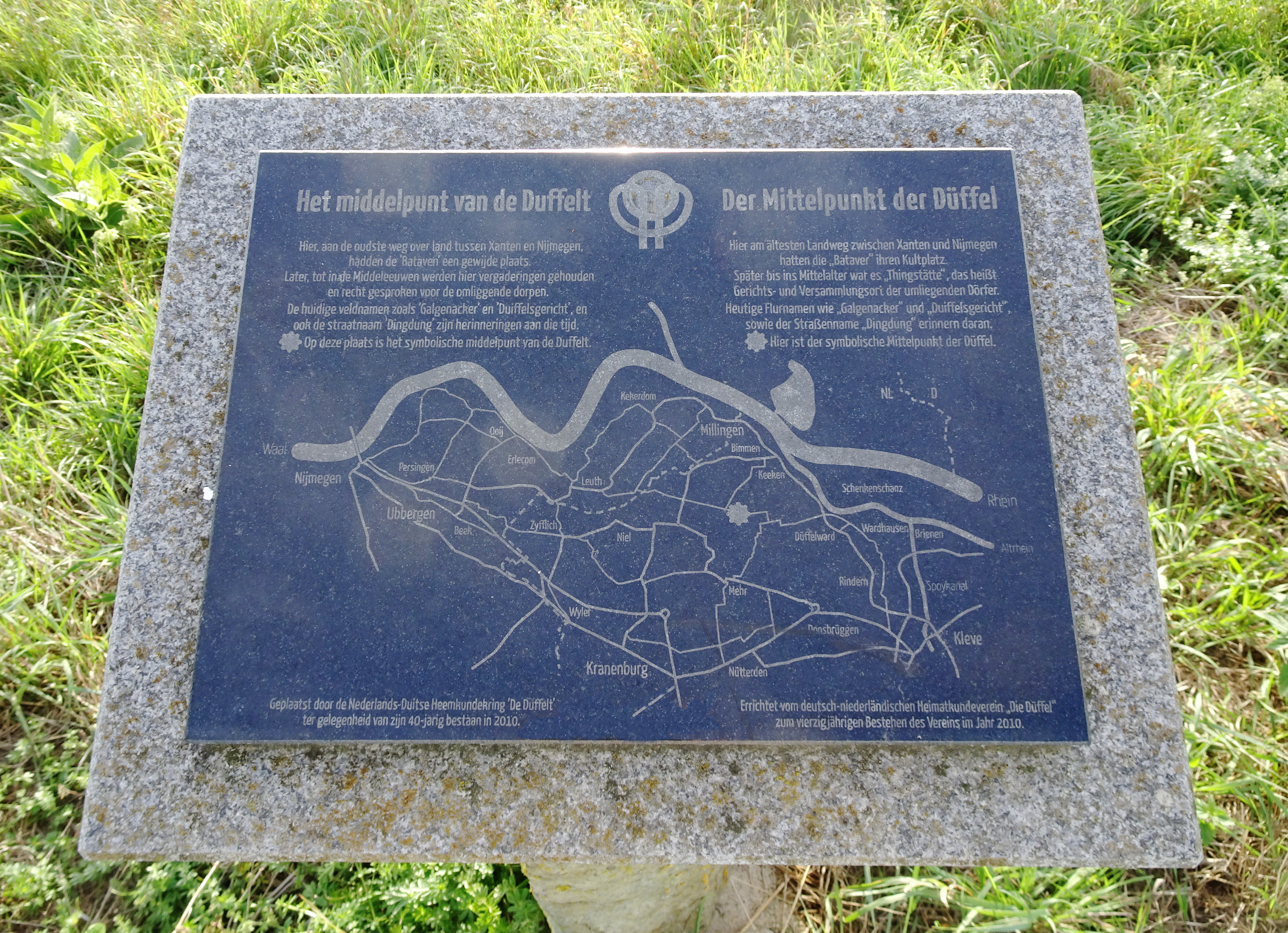 Gedenkteken: Het middelpunt van De Duffelt, Omgeving Keeken, Zyfflicher Straße